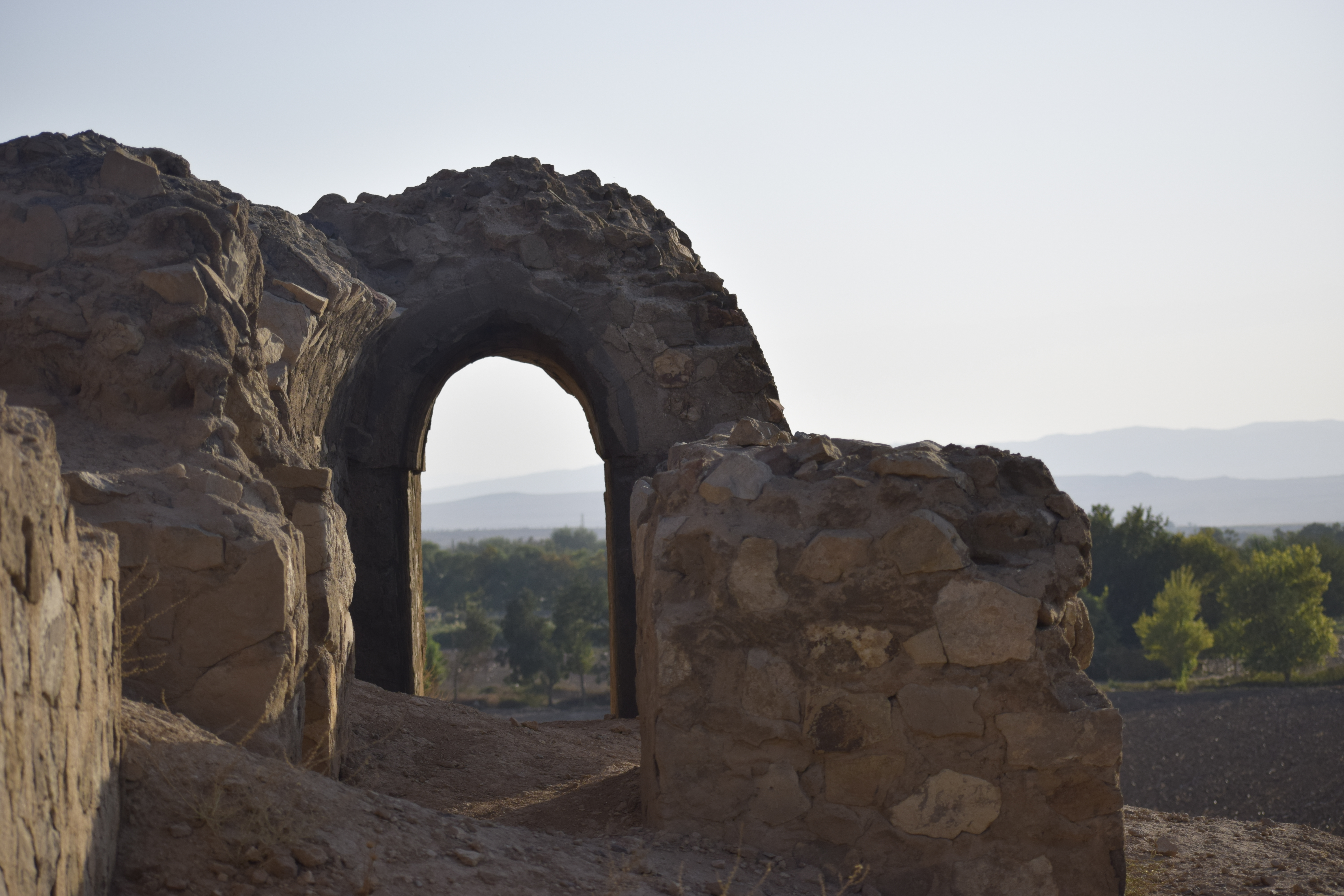 تپه میل